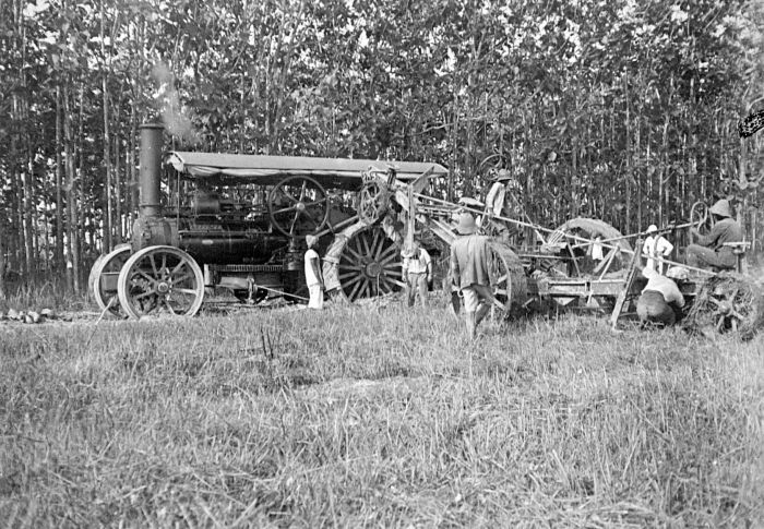 Repronegatief. Het testen van de stoomploeg van de Deli Maatschappij